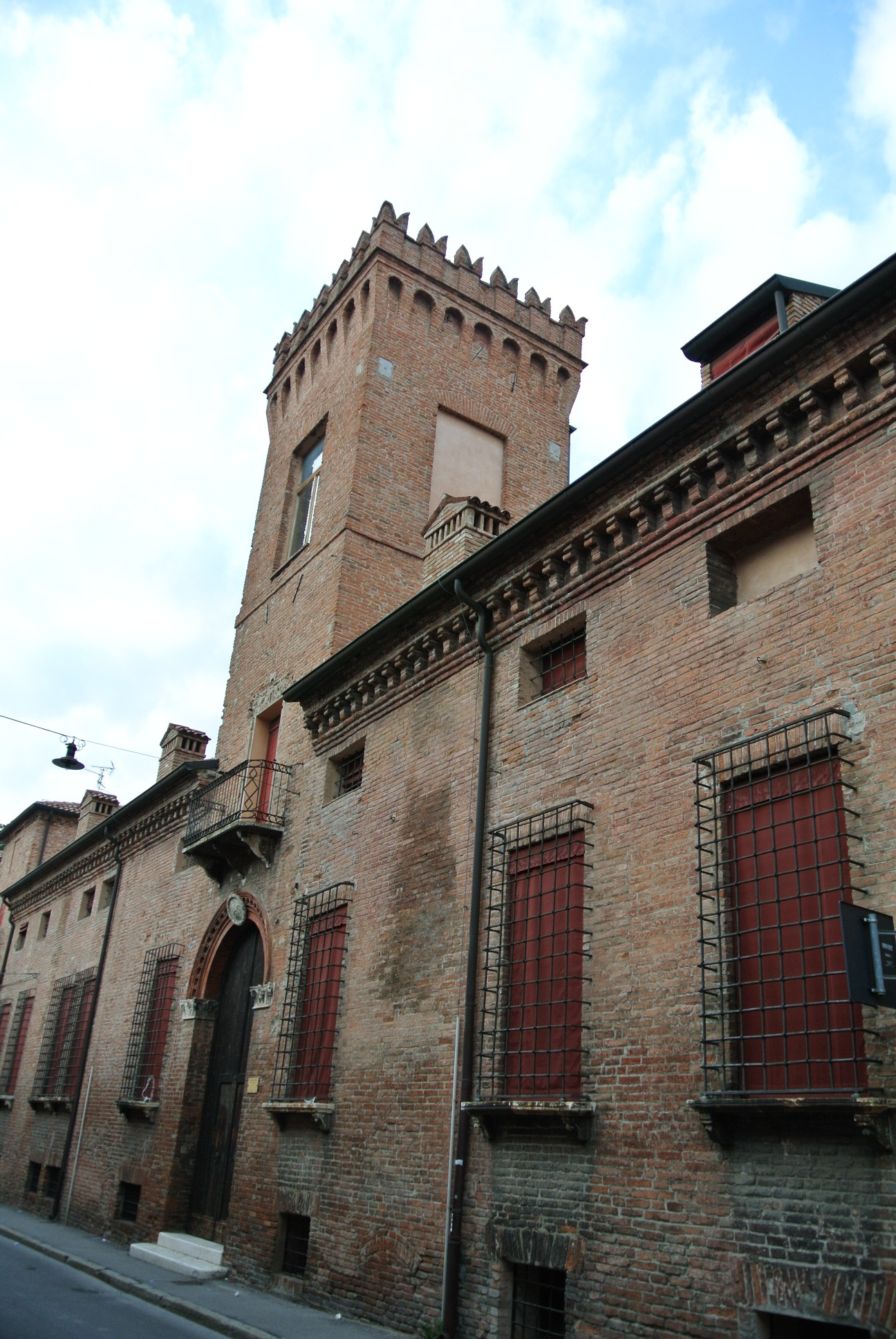 VISTA LATERALE